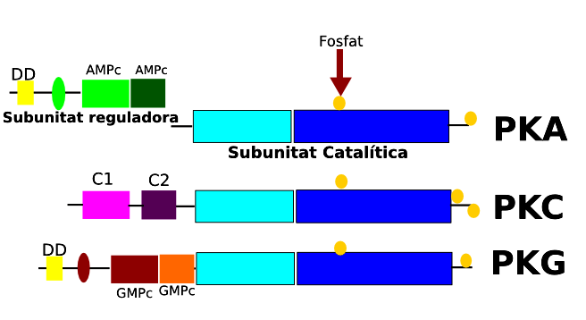 En aquesta imatge podem observar les dues subunitats de la cinasa, la catalítica que és molt semblant entre els diferents tipus, i la reguladora que és la que més varia segons el substrat. Hi tenim la PKA, la PKC i la PKG.